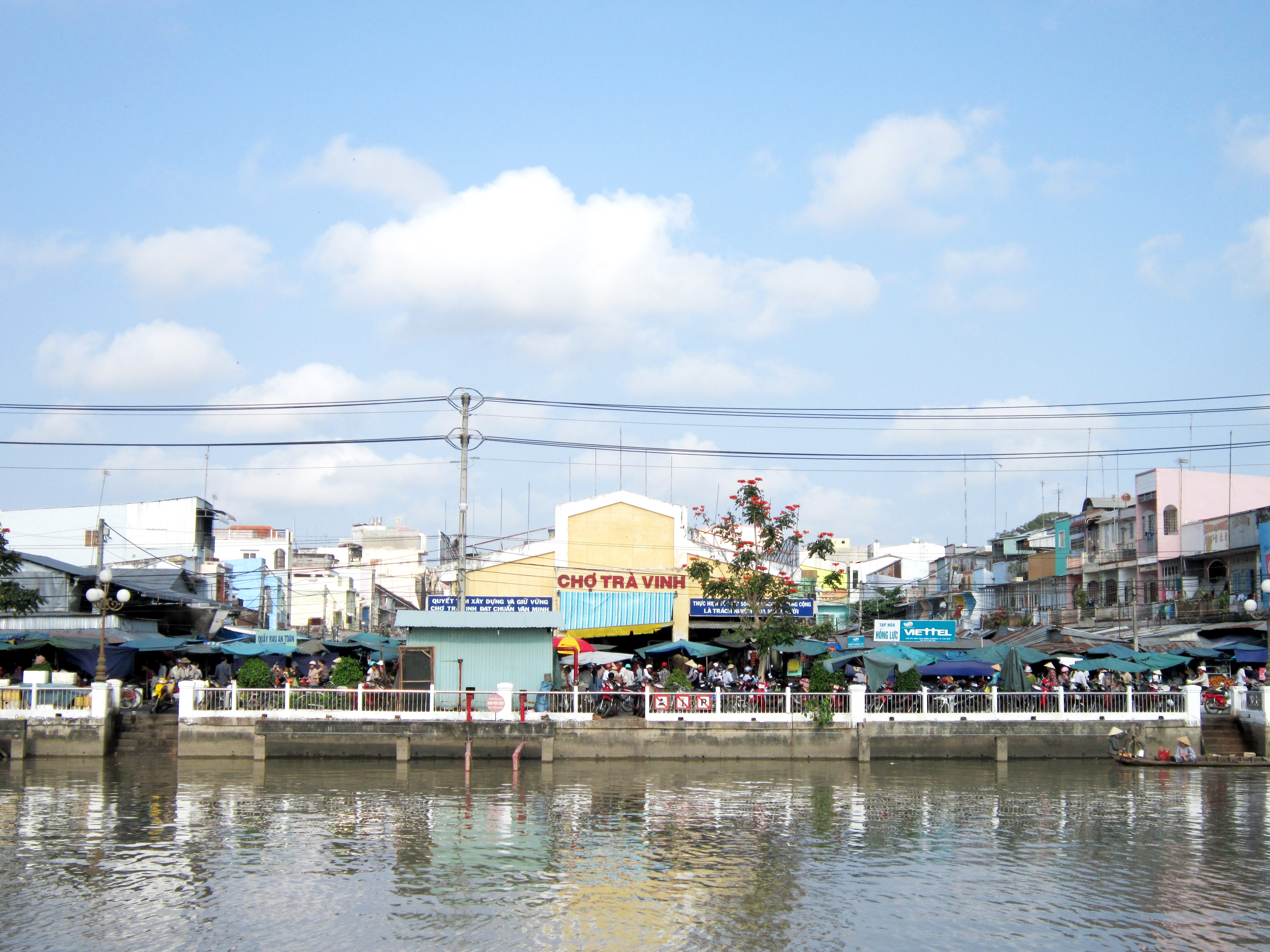 Chợ Trà Vinh nằm bên một dòng kênh tại thị xã Trà Vinh (Việt Nam).